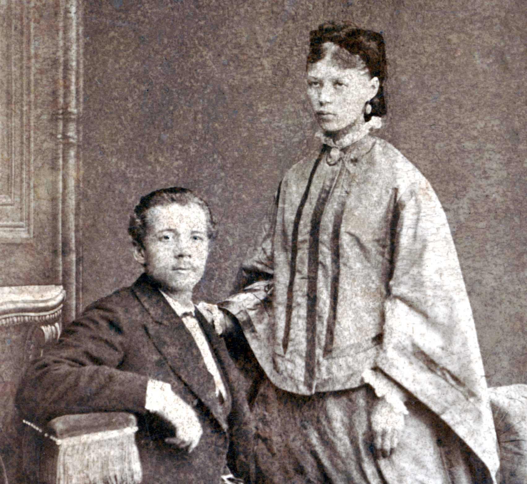 Сергей Сергеевич Никольский c женой Ольгой (в дев. Старостина), дедушка и бабушка художника Сергея Маркина